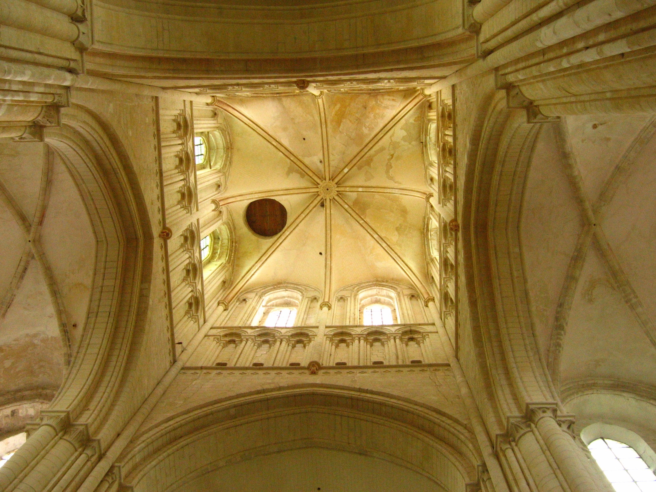 Intérieur de la tour-lanterne, église abbatiale de Fécamp, Seine-Maritime, Haute-Normandie, France.